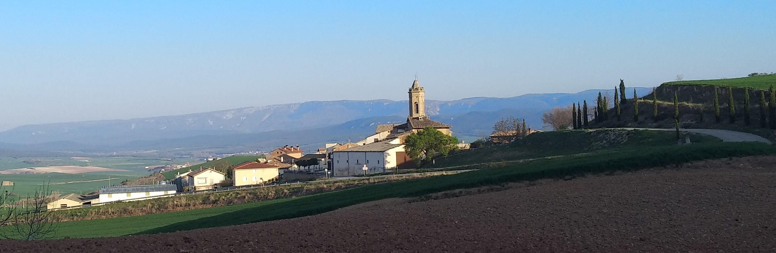 Olejua (Navarra)